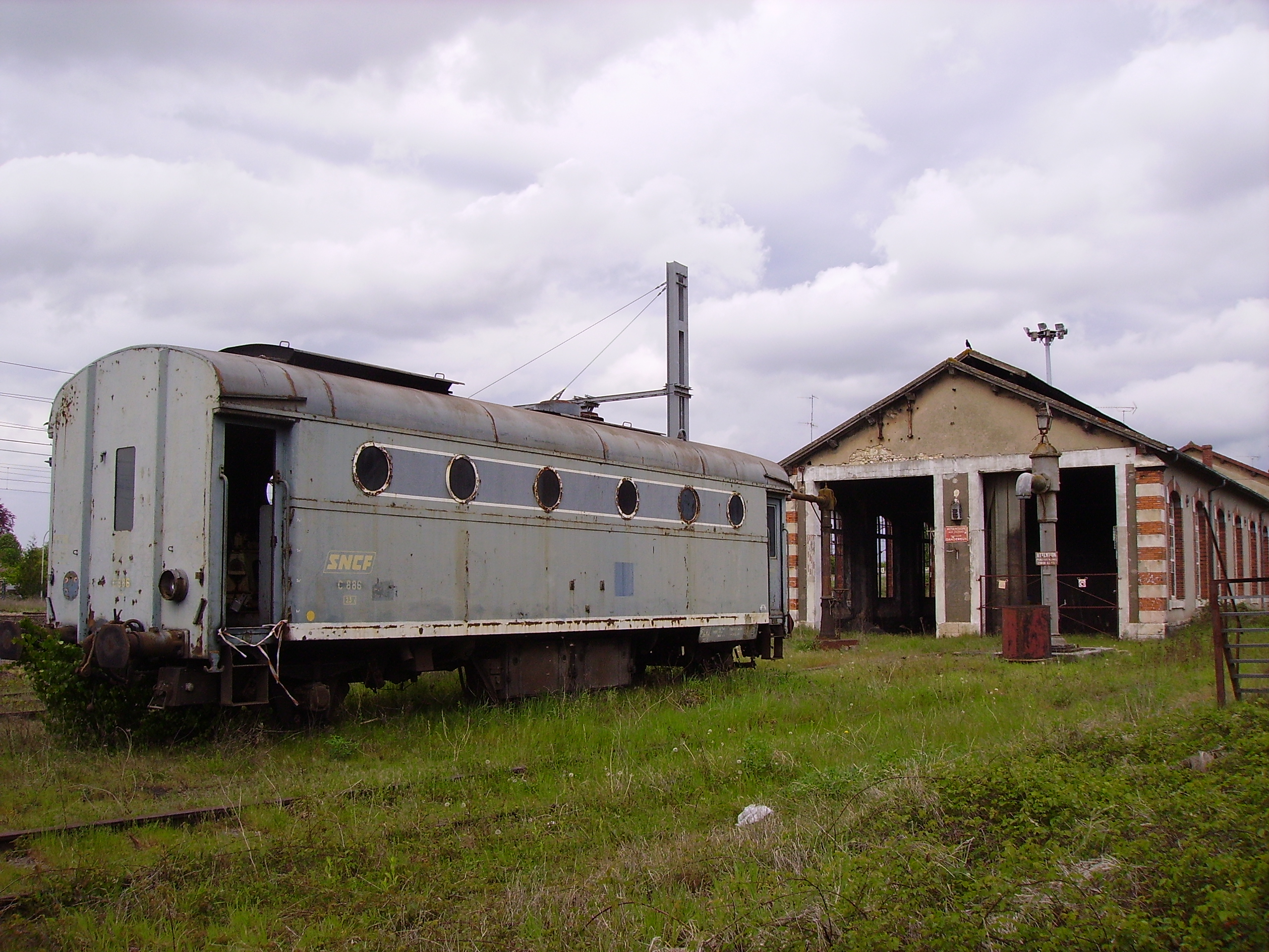 Le fourgon-chaudière C 886 SNCF. Une prise d'eau est visible à droite, qui porte l'inscription : « Attention - Prenez les mesures contre le gel ». Offert par l'EMT SNCF de Chalindrey en 2003 à la section Centre-Val de Loire de l'AAATV (Amicale des Anciens et Amis de la Traction Vapeur). Transféré en 2003 à l'ancien dépôt de la gare de Cosne-sur-Loire (dépôt visible depuis la rue Eugène Perreau). Plus d'info à